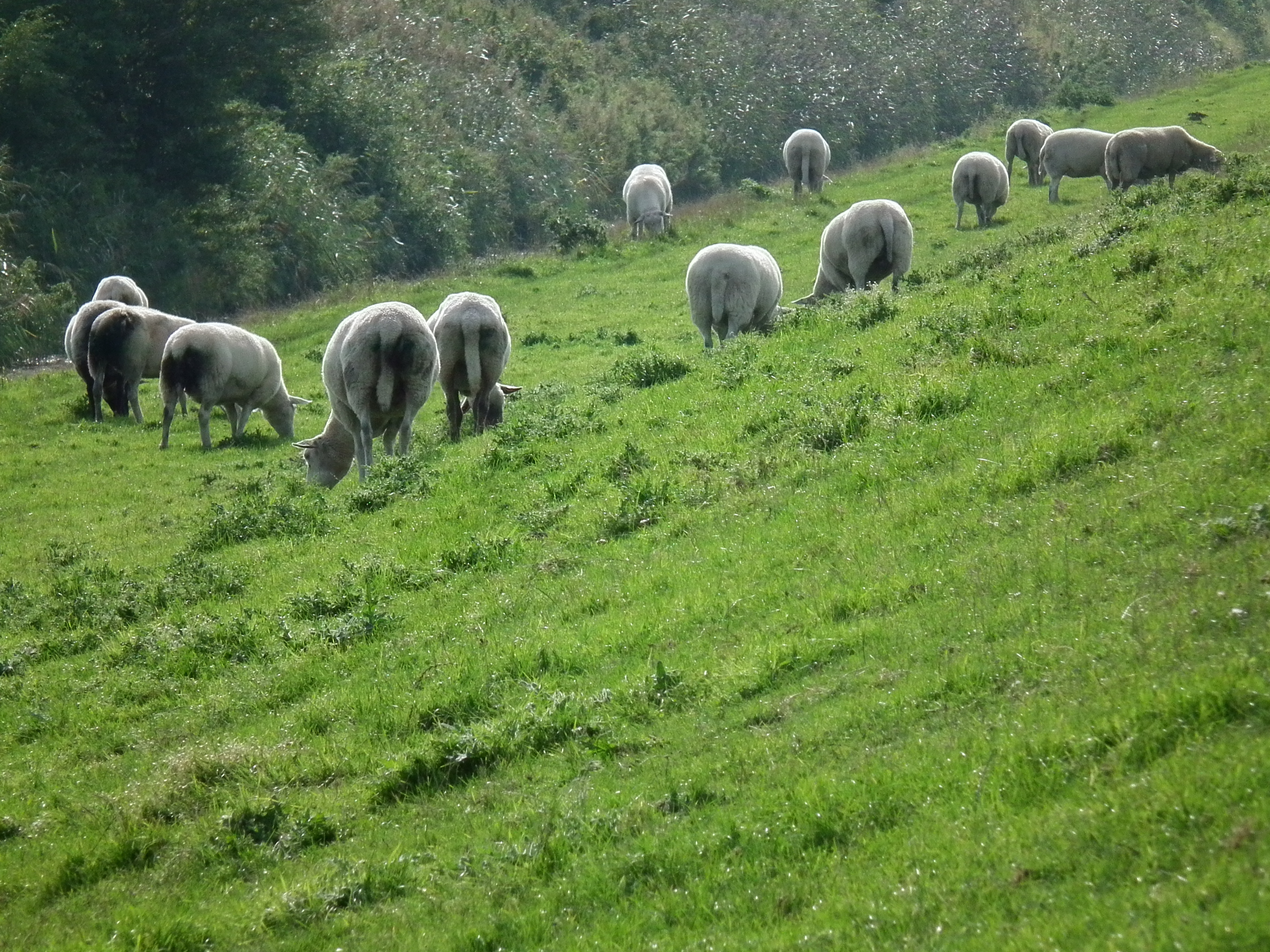 Herde grasender Deichschafe in der Nähe von Greetsiel (Niedersachsen, Deutschland)